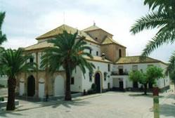 Ermita de Jesús en Morón de la Frontera